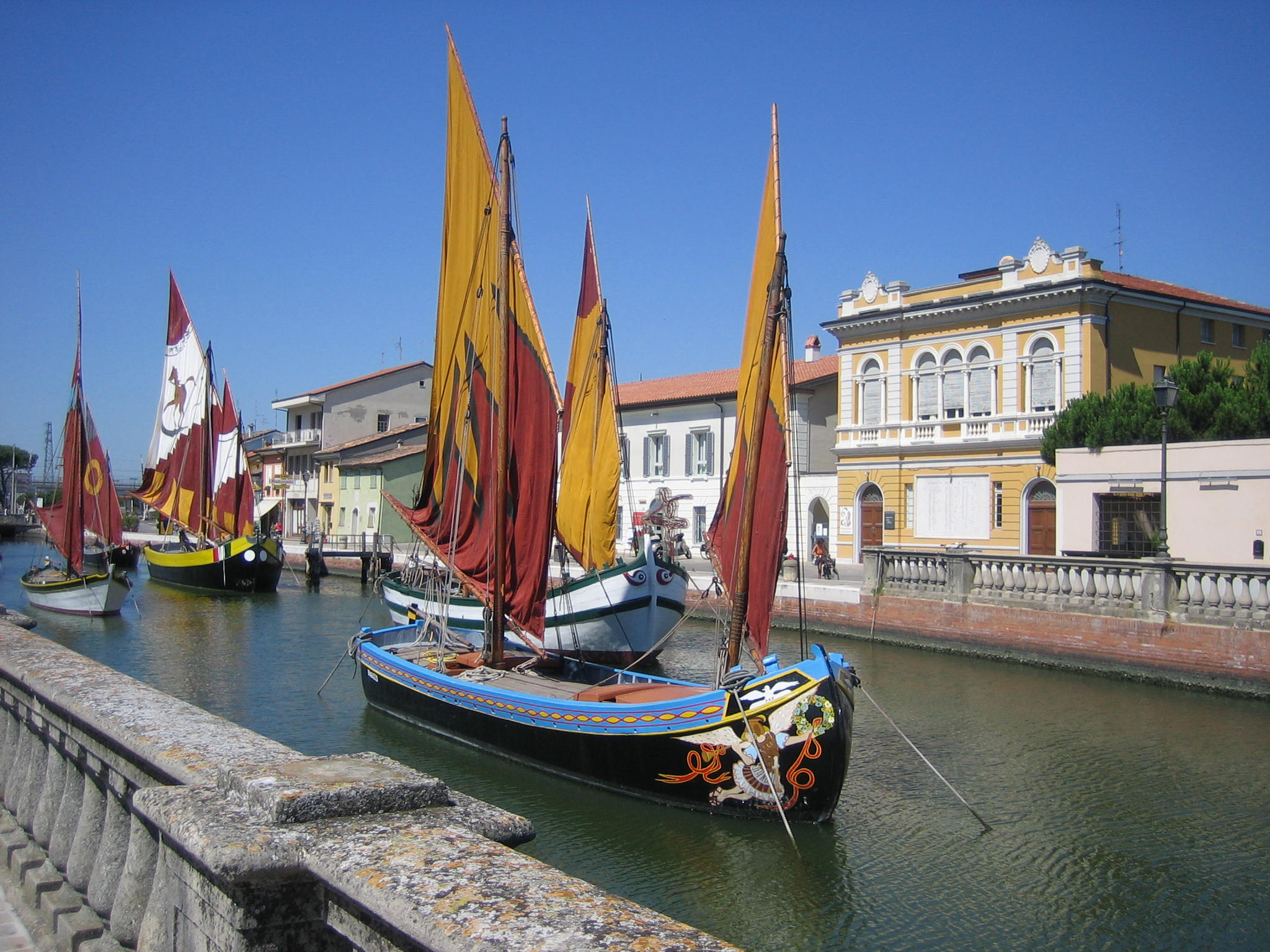 Porto Canale Leonardesco This is a photo of a monument which is part of cultural heritage of Italy.